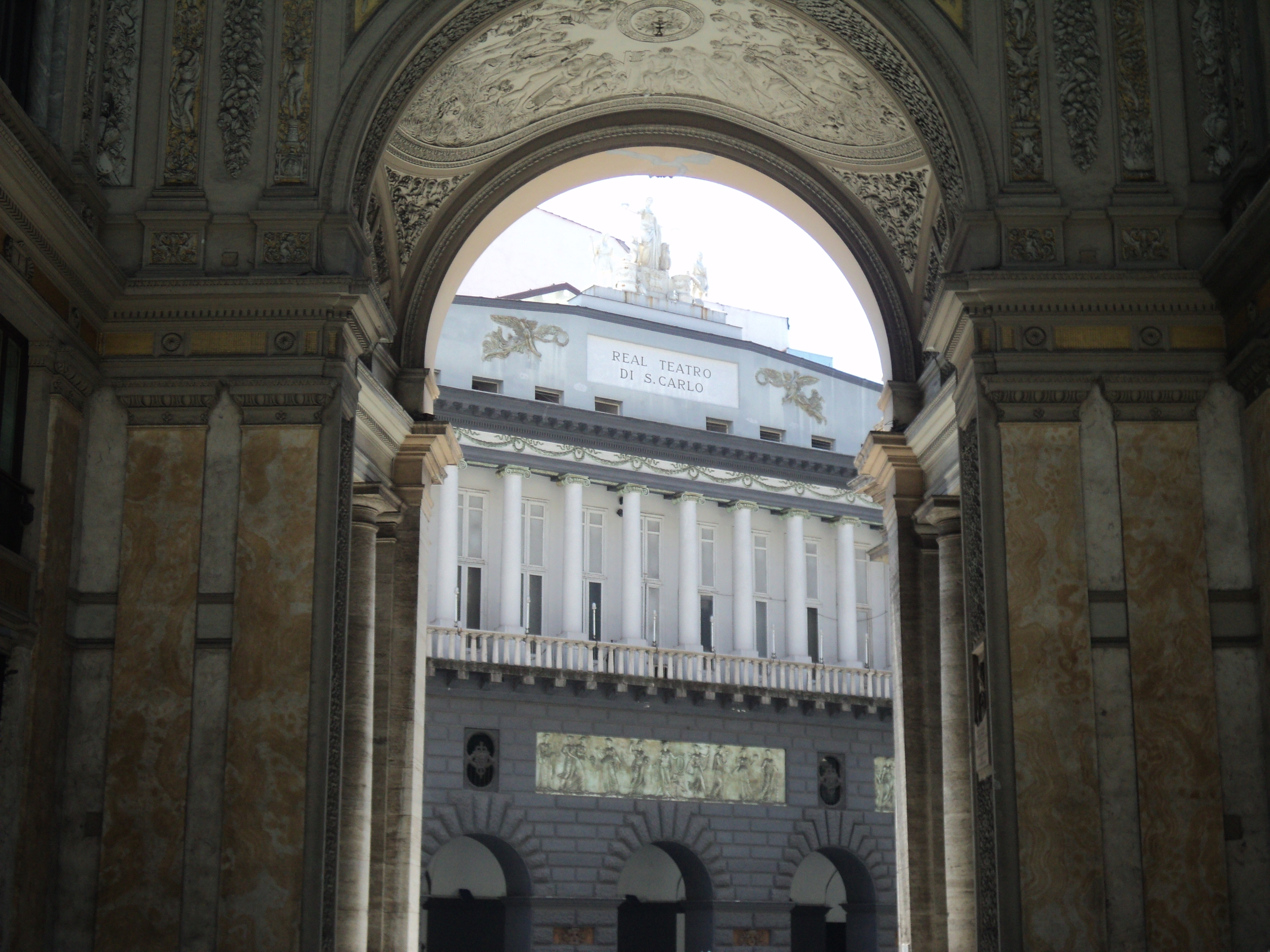 Galleria Umberto I di Napoli